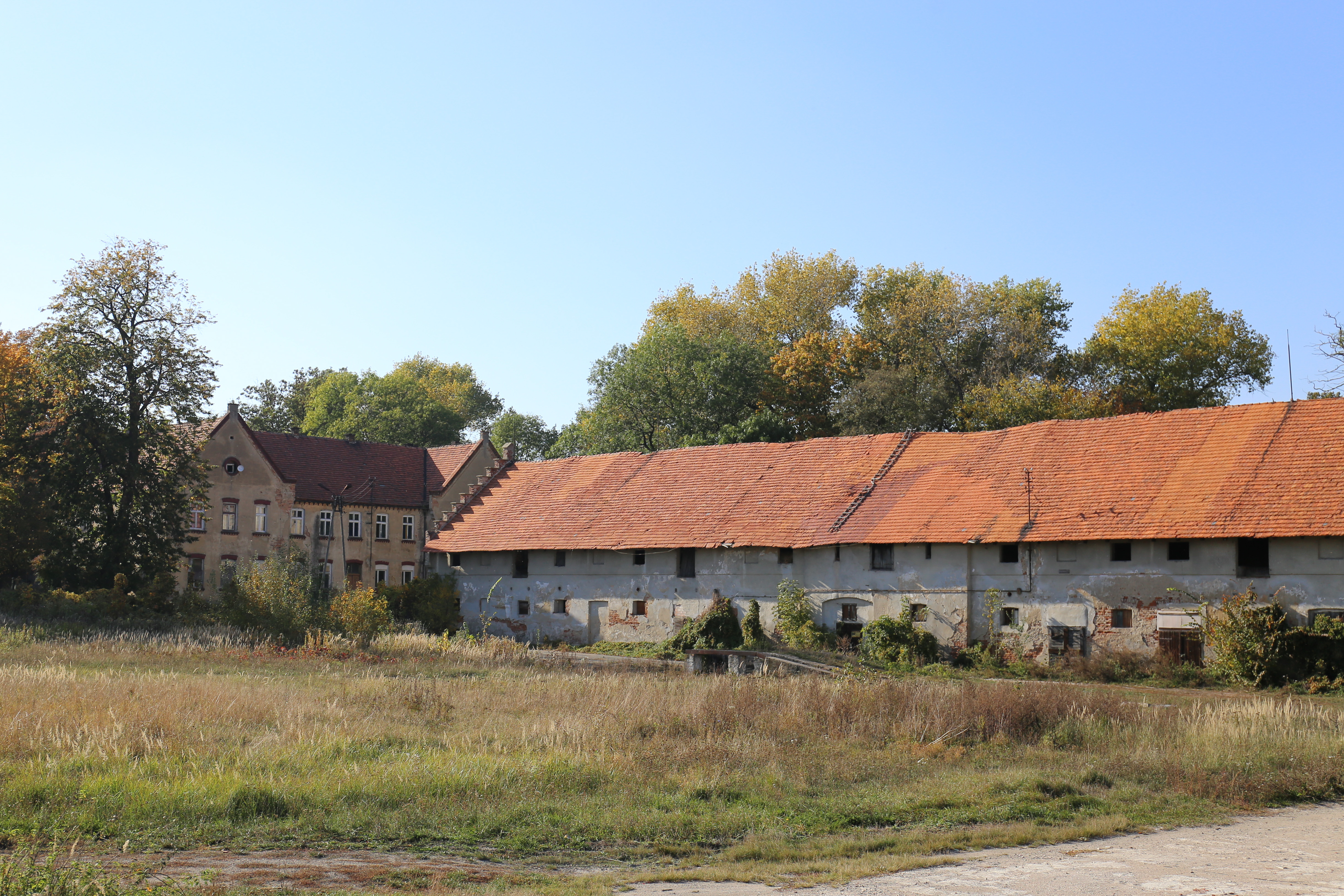 Czerńczyce – wieś w Polsce, w województwie dolnośląskim, w powiecie wrocławskim, w gminie Kąty Wrocławskie.